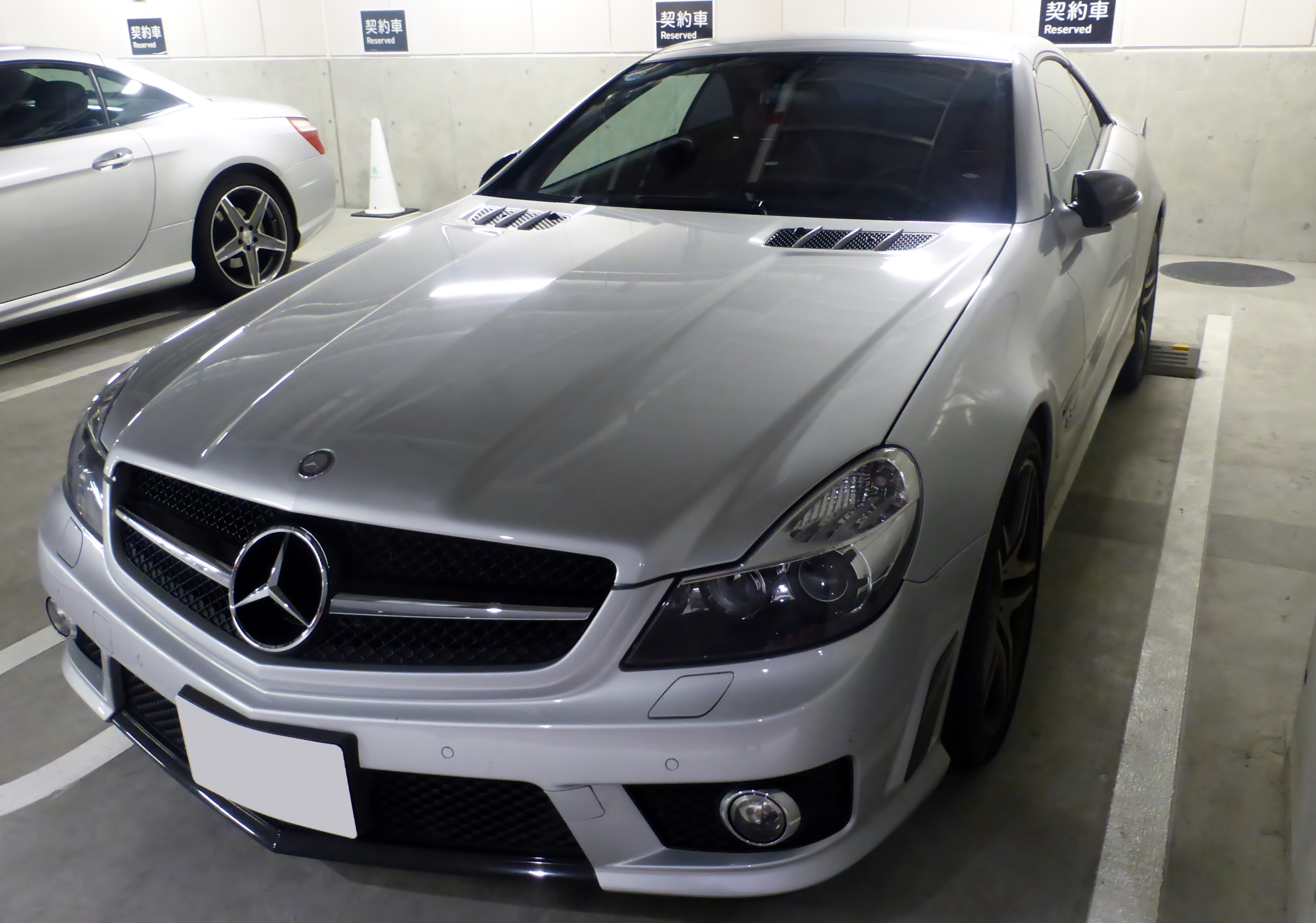 R230後期型メルセデス・ベンツSL63 AMGをフロントから撮影。